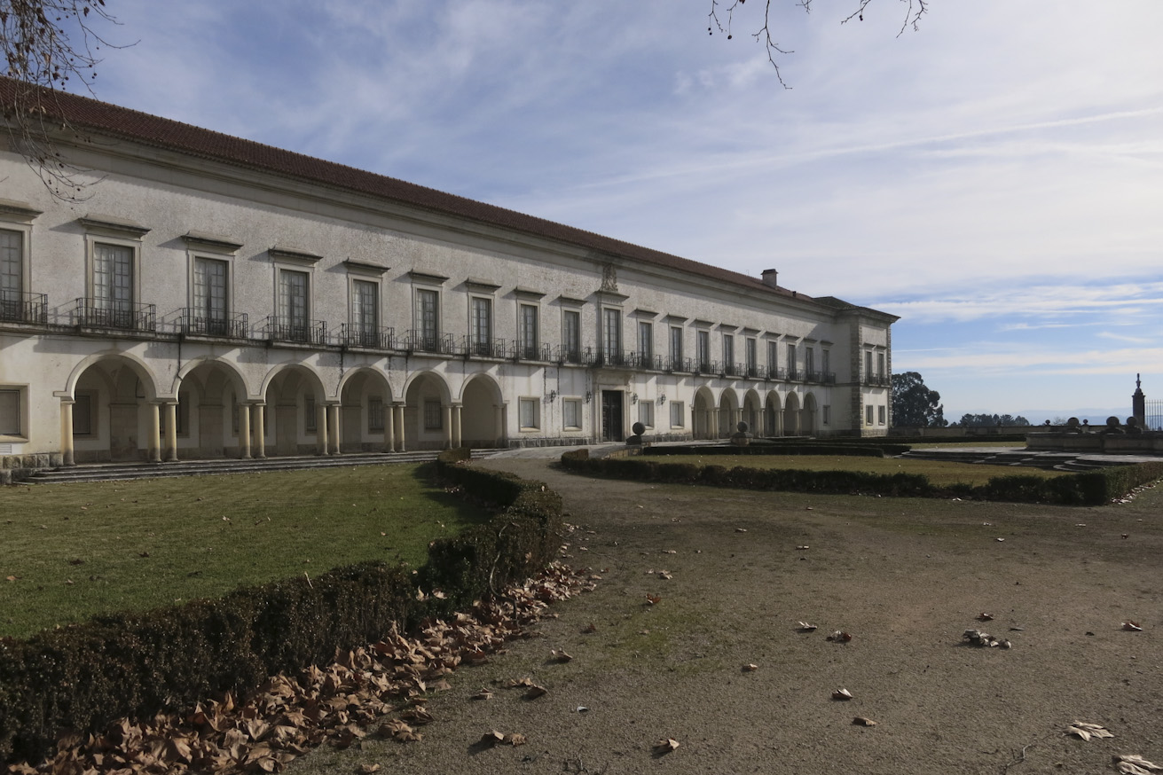 Mosteiro de S. Marcos de Coimbra